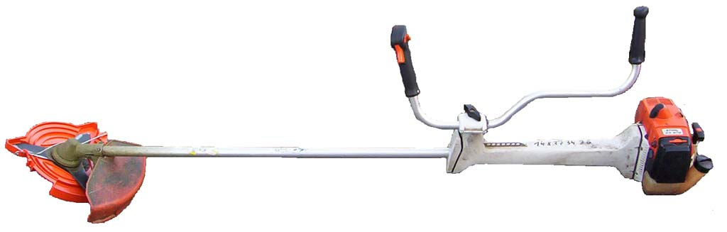 Freischneider Stihl FS 350 mit 2 PS - Zweitaktmotor. Das Messer kann nach Wunsch durch einen Nylonfaden getauscht werden.